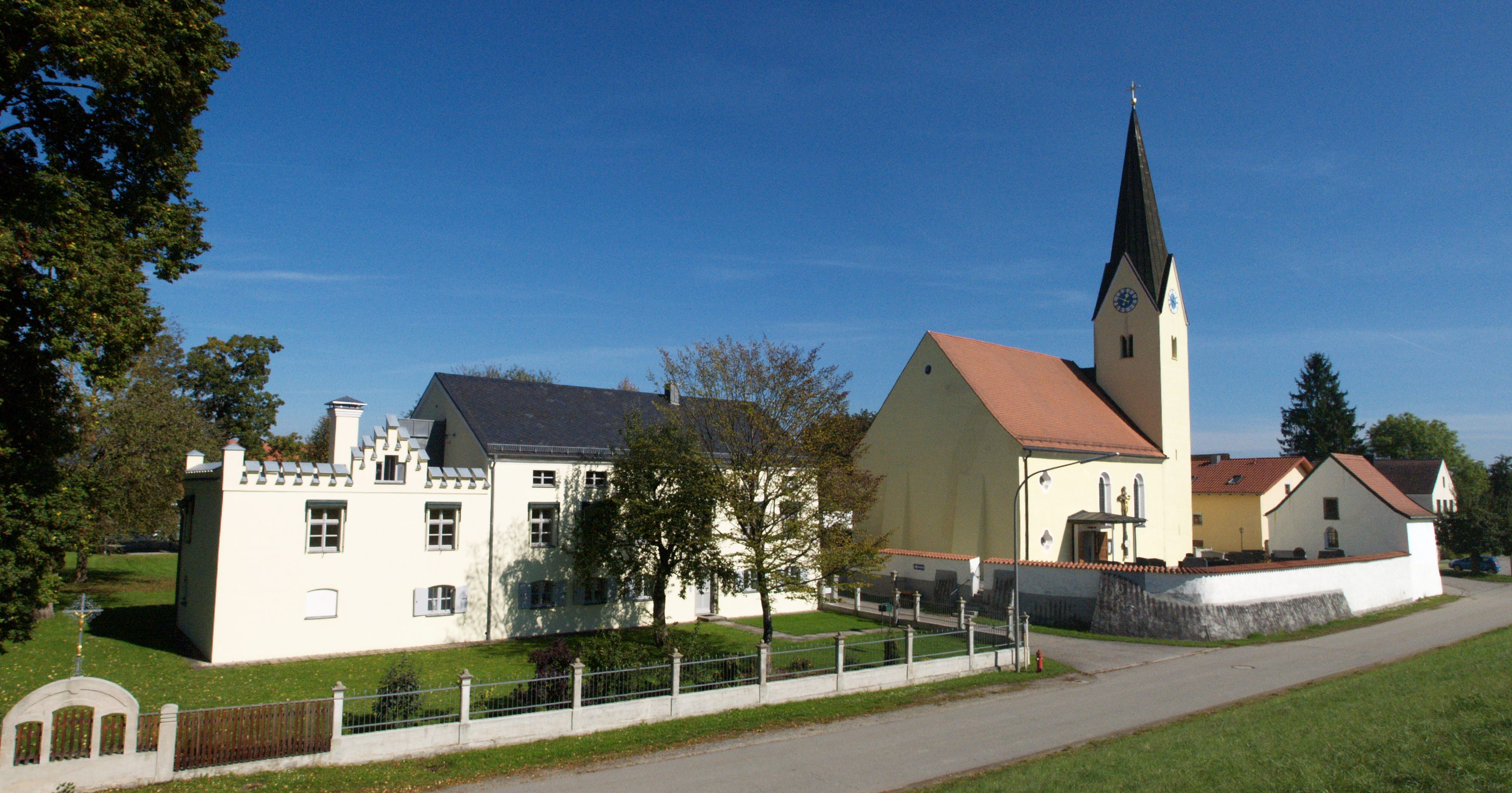 Mariaposching Kirche und Pfarrhof